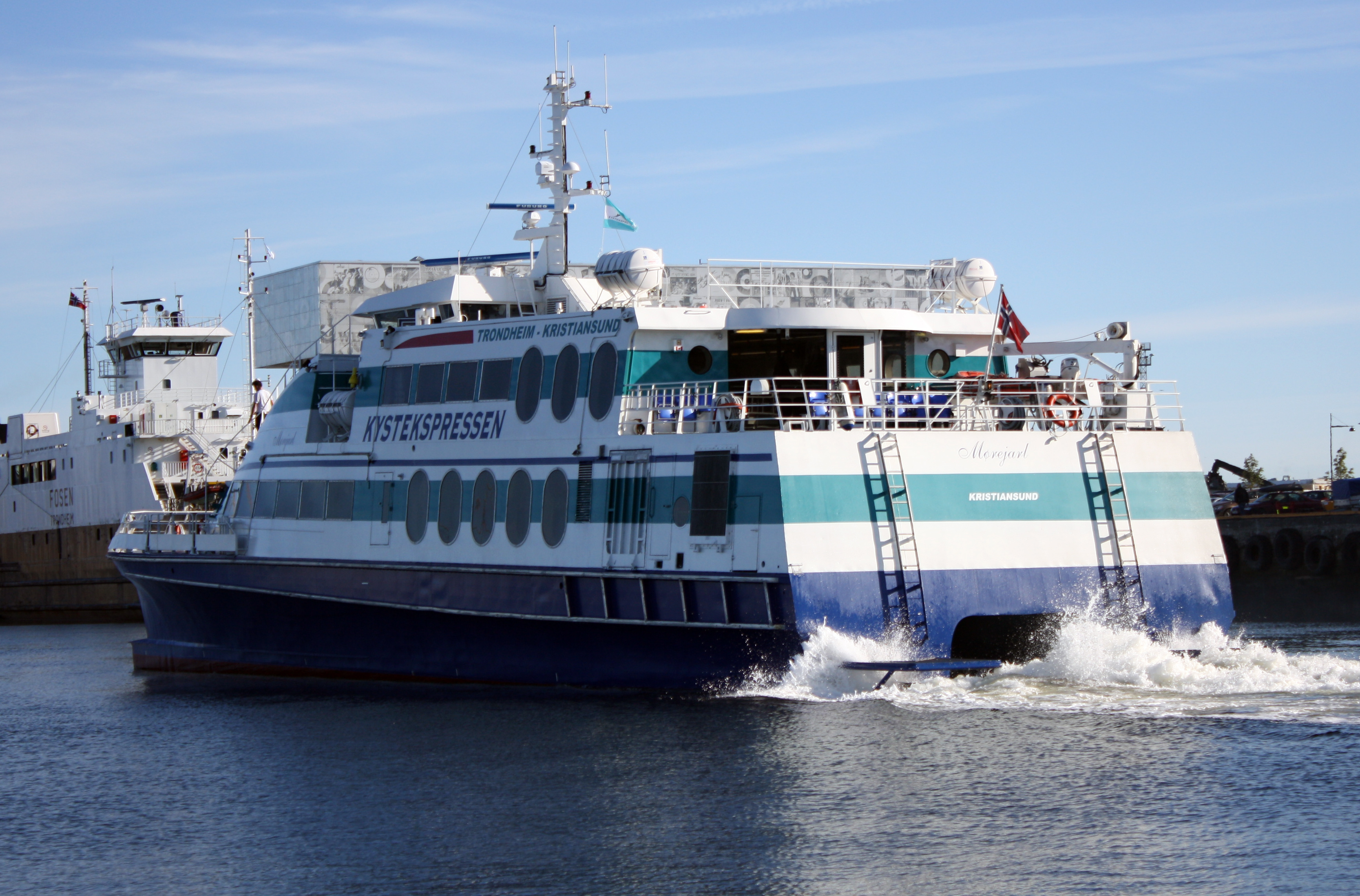 Kystekspressens Mørejarl på vei inn til hurtigbåtterminalen i Trondheim.